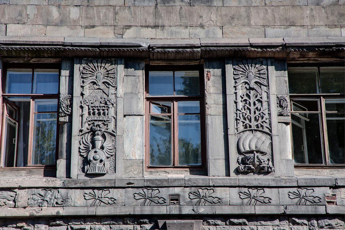 ул.Ленина,8; 22.08.2009